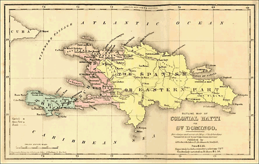 Este mapa colonial de la Isla de Santo Domingo muestra la frontera original entre la colonia francesa de Saint Domingue y la provincia española de Santo Domingo en base al Tratado de Aranjuez de 1777. Nótese que la frontera de entonces no es la misma que ahora separa a la República Dominicana (Santo Domingo) de Haití (Saint Domingue), debido a que la frontera fue modificada en las décadas de 1920 y 1930 en tratados entre ambos estados donde República Dominicana le cedió a Haití aproximadamente 5.000 KM2 que eran reclamados por Haití. Así se le puso final a ese conflicto.